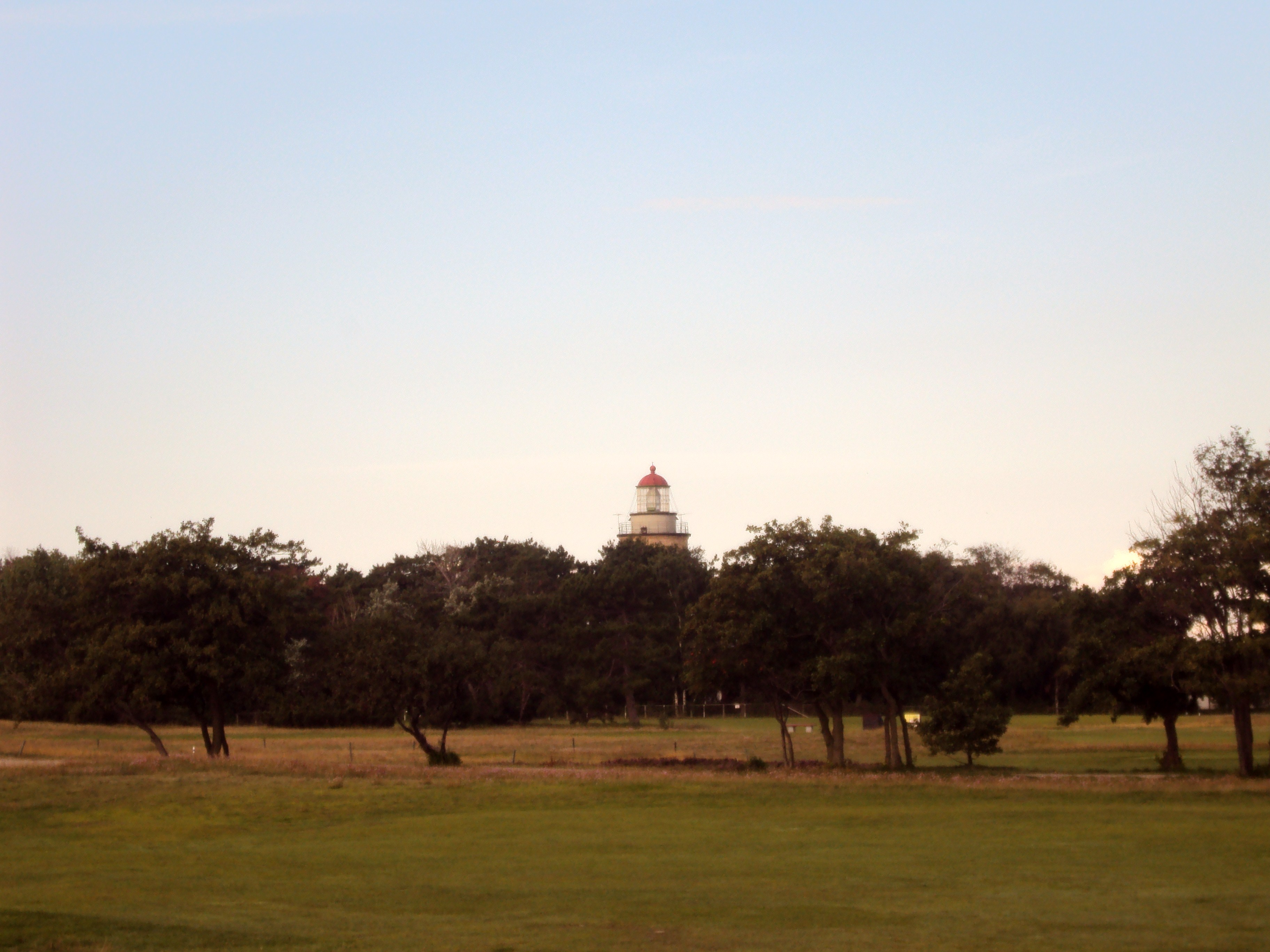 Falsterbo fyr i bakgrunden med golfbanan i förgrunden